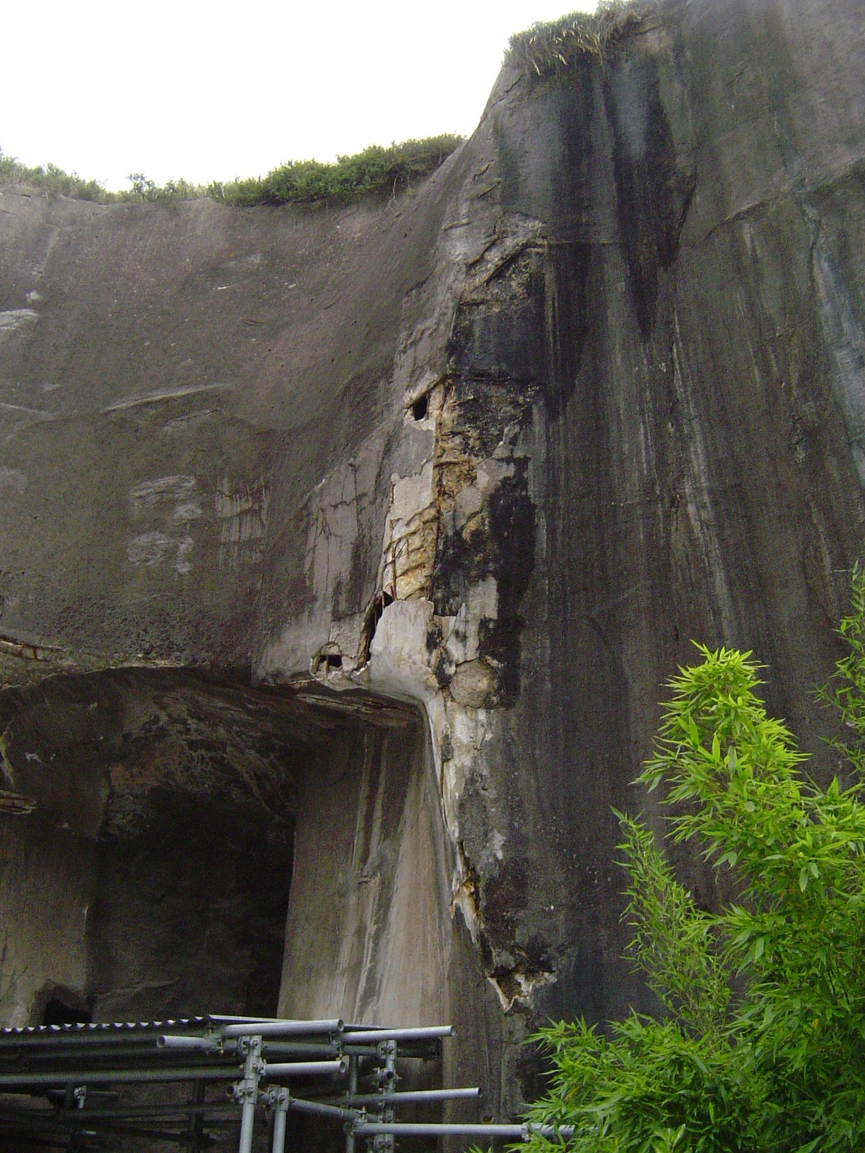 Zoo de Vincennes